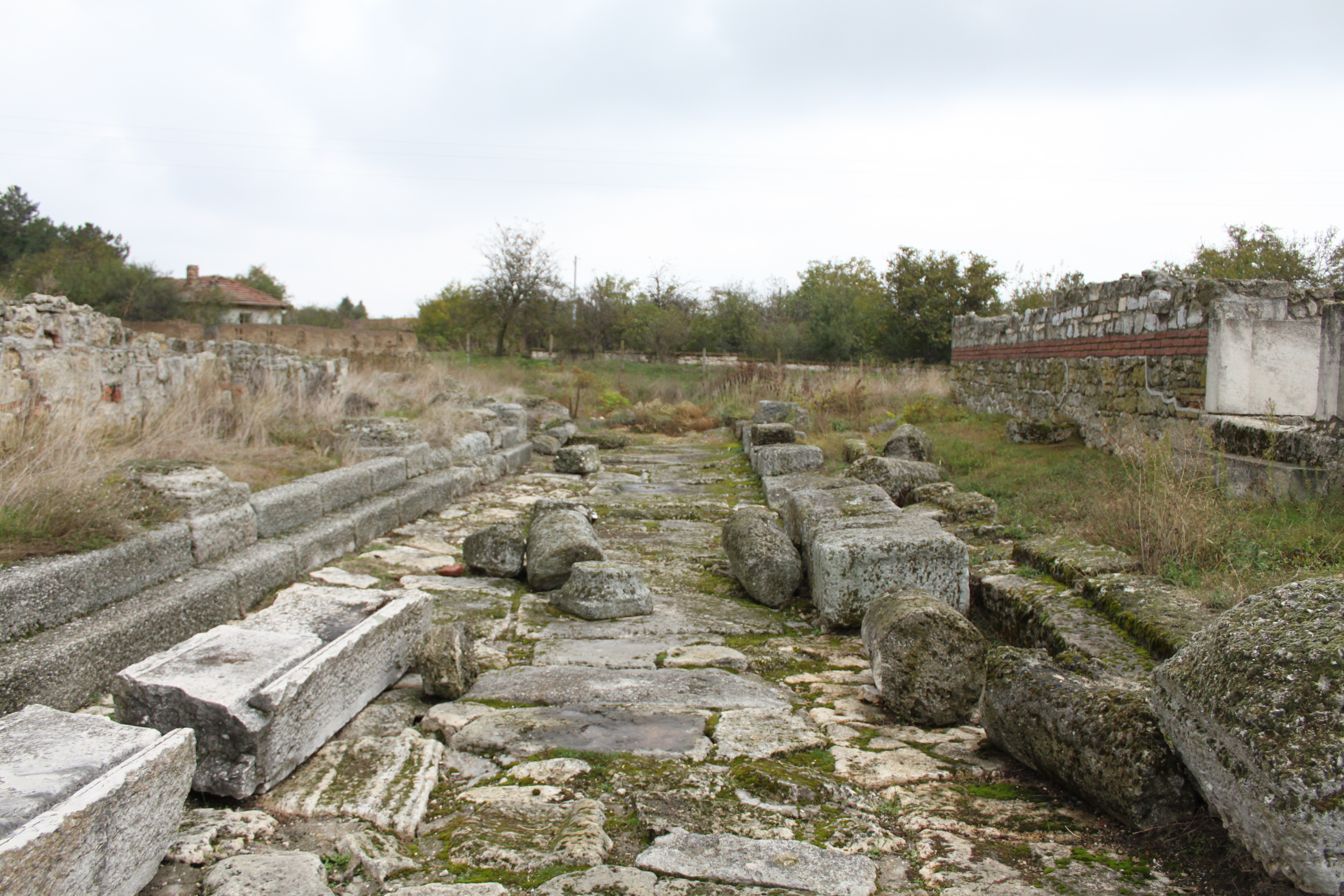 Colonia Ulpia Oescus: lateinisch Ulpia Escus; Nordbulgarien; an der Donau; beim Dorf Gigen; menschenleer; eingezäunt; gepflegte Anlage